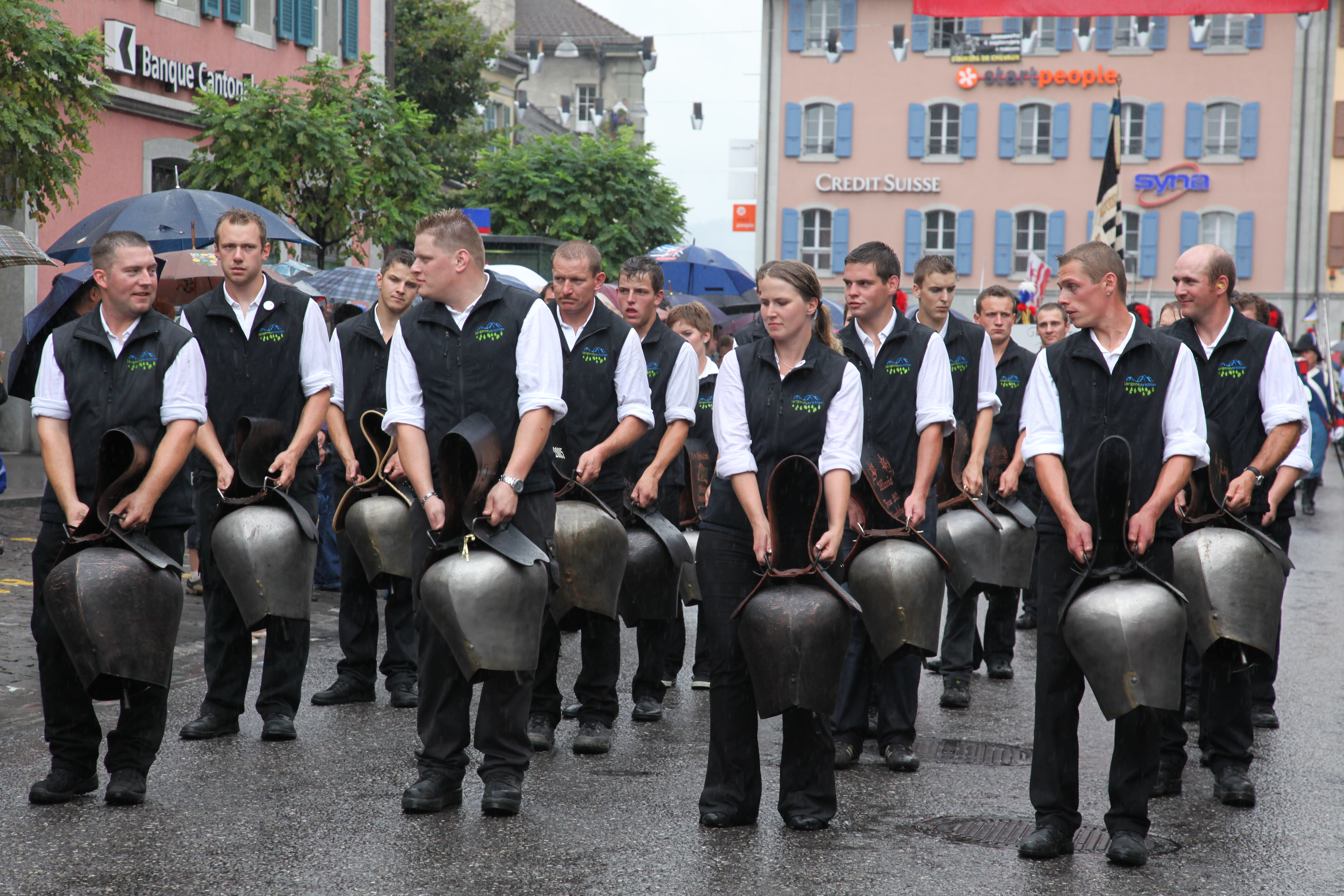 Instantanés de la Fête fédérale des sonneurs de cloches à Bulle (canton de Fribourg en Suisse). Cortège du 4 septembre 2011. Umzug vom sonntag 4. September durch die Stadt Bulle. Photo: Pierre Schwaller